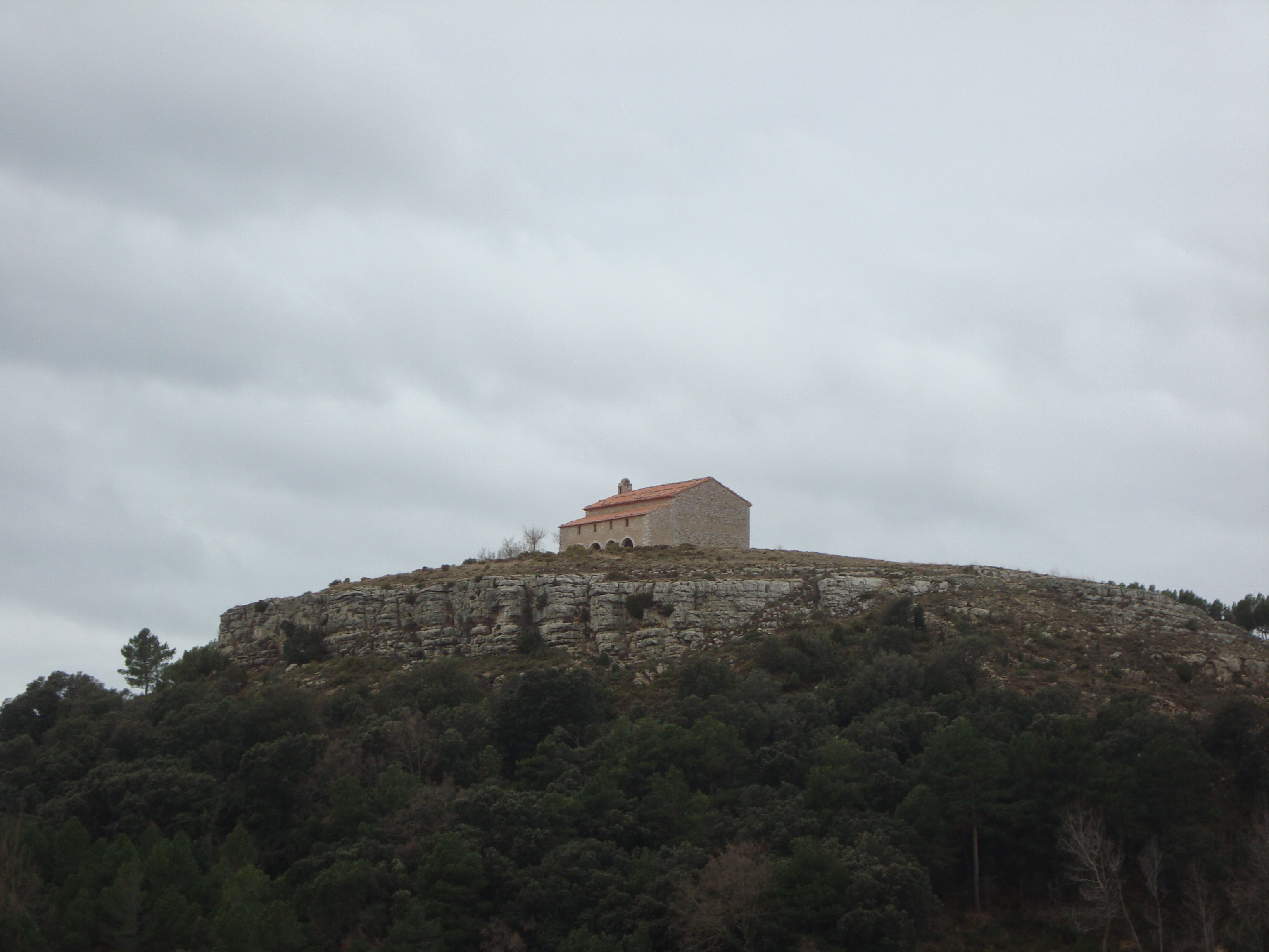 Ermita de San Cristobal de Culla